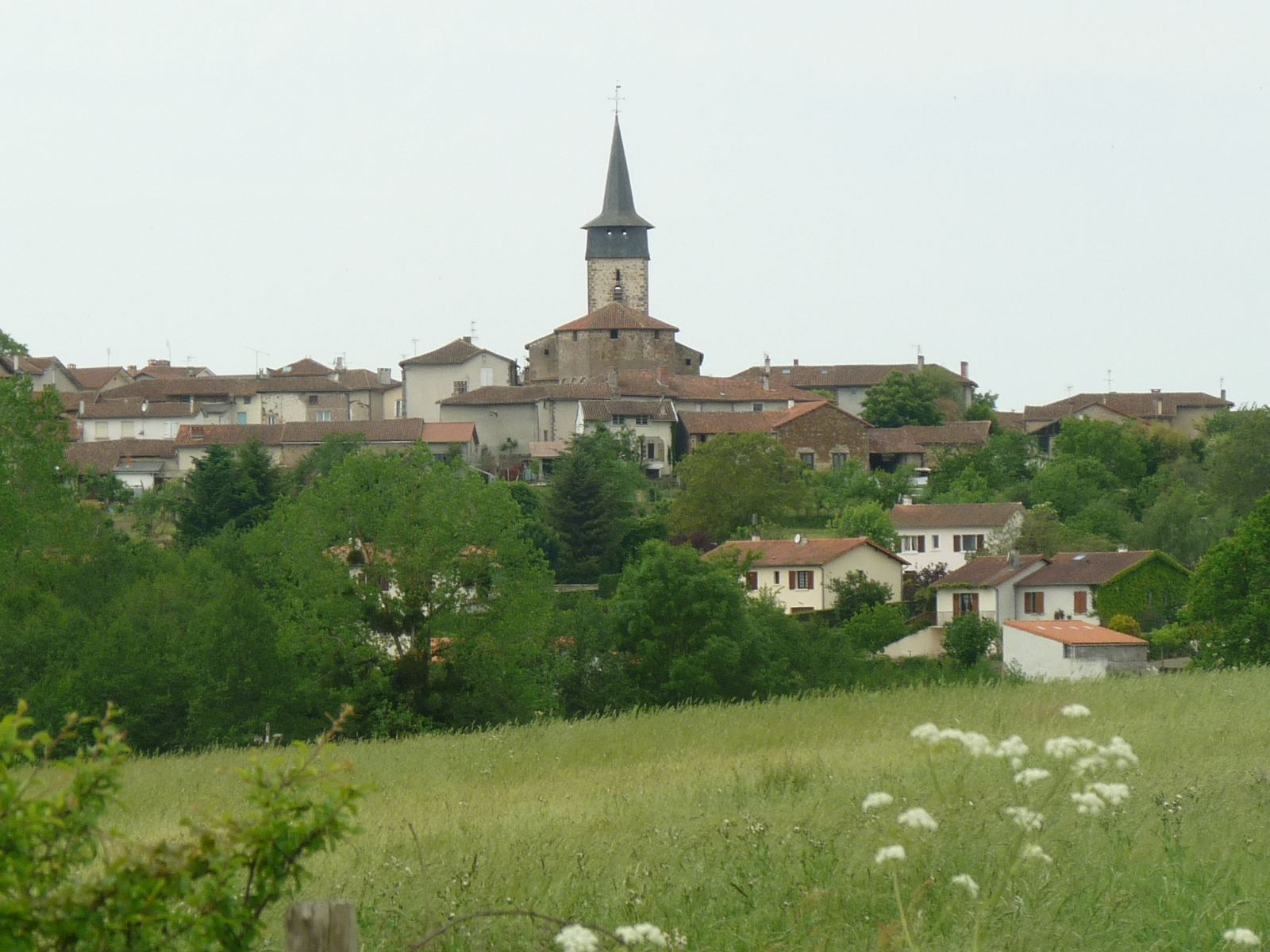 vue de St-Maurice-des-Lions depuis la route de Lésignac, Charente, France